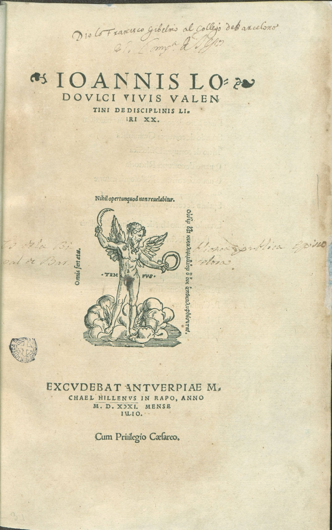 Portada de l'obra "De Disciplinis" (1531) de Lluís Vives. Antuerpiae (Anvers): Excudebat Michael Hillenius, 1531.